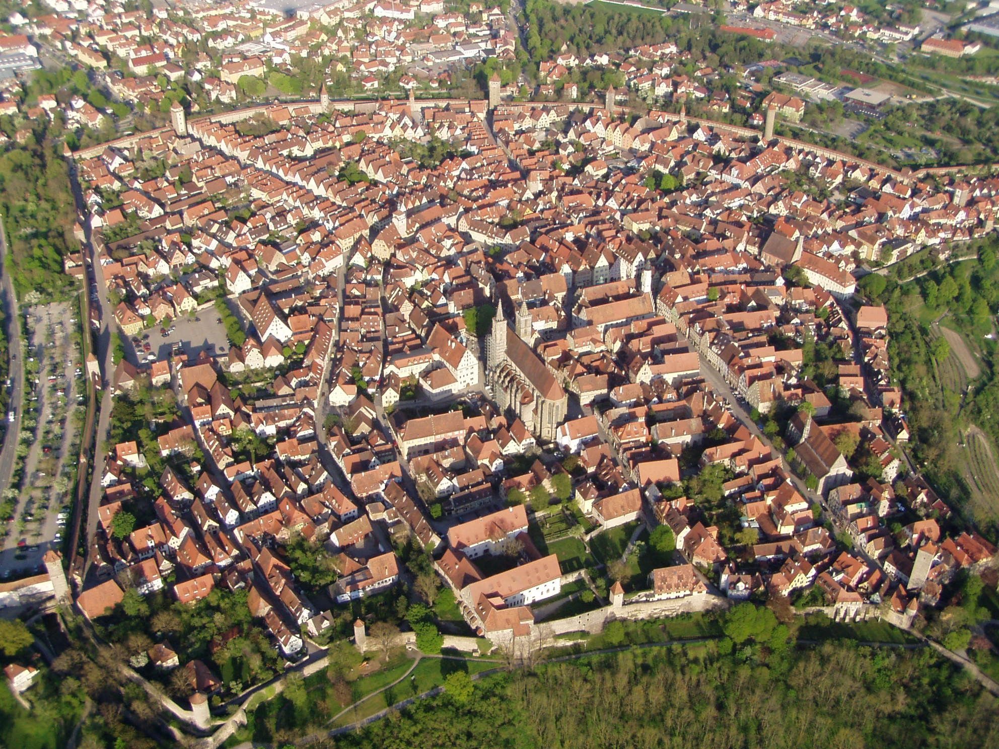 Rothenburger Altstadt aus dem Ballonkorb